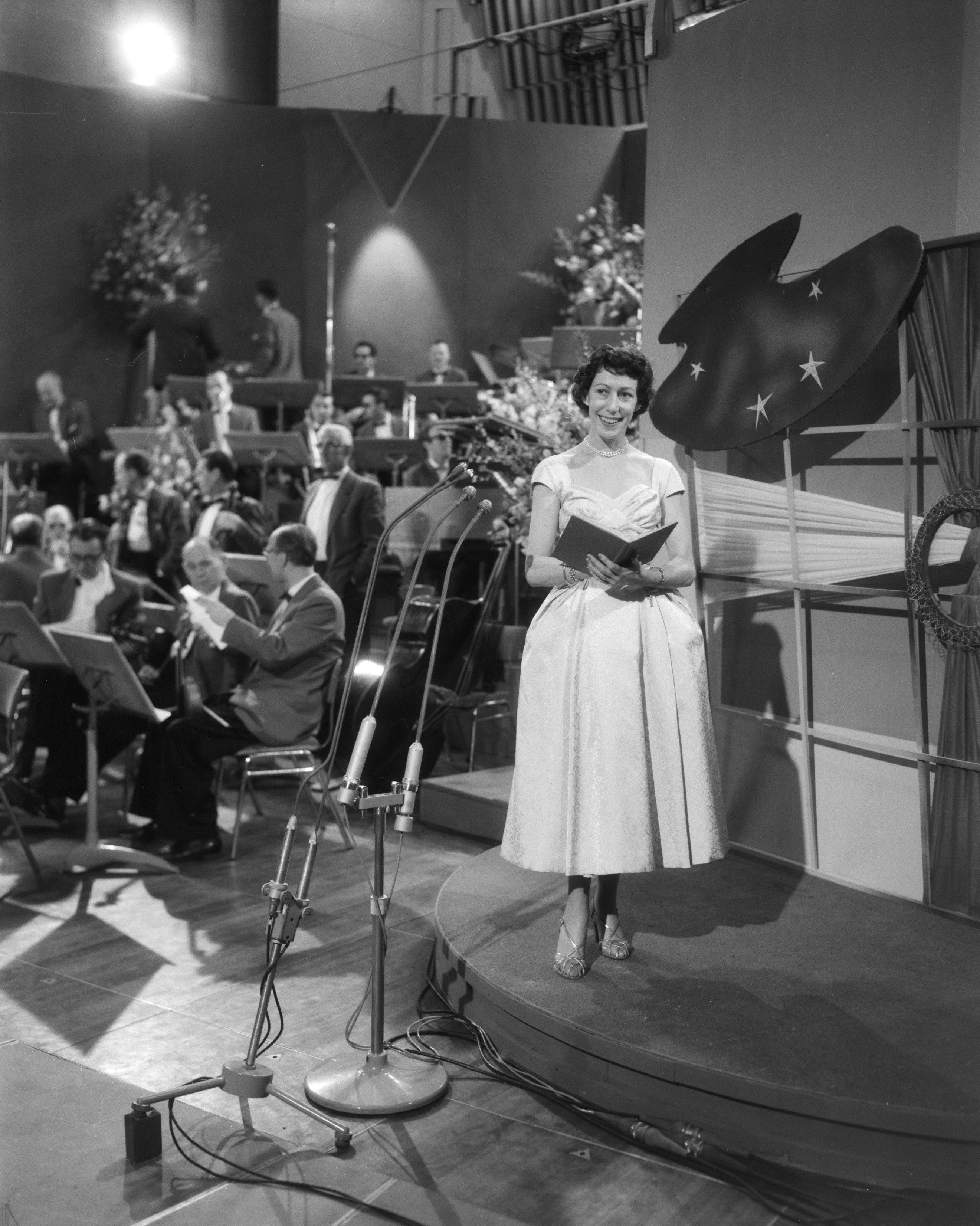 Collectie / Archief : Fotocollectie Anefo Reportage / Serie : Songfestival 1958 Beschrijving : Deelnseemster Raquel Rastenni (Denemarken) Datum : 11 maart 1958 Locatie : Hilversum, Noord-Holland Trefwoorden : songfestivals, zangeressen Persoonsnaam : Rastenni, Raquel Fotograaf : Pot, Harry / Anefo Auteursrechthebbende : Nationaal Archief Materiaalsoort : Negatief (zwart/wit) Nummer archiefinventaris : bekijk toegang 2.24.01.04 Bestanddeelnummer : 909-4005